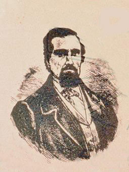 Ca:Abdó Terrades i Poli